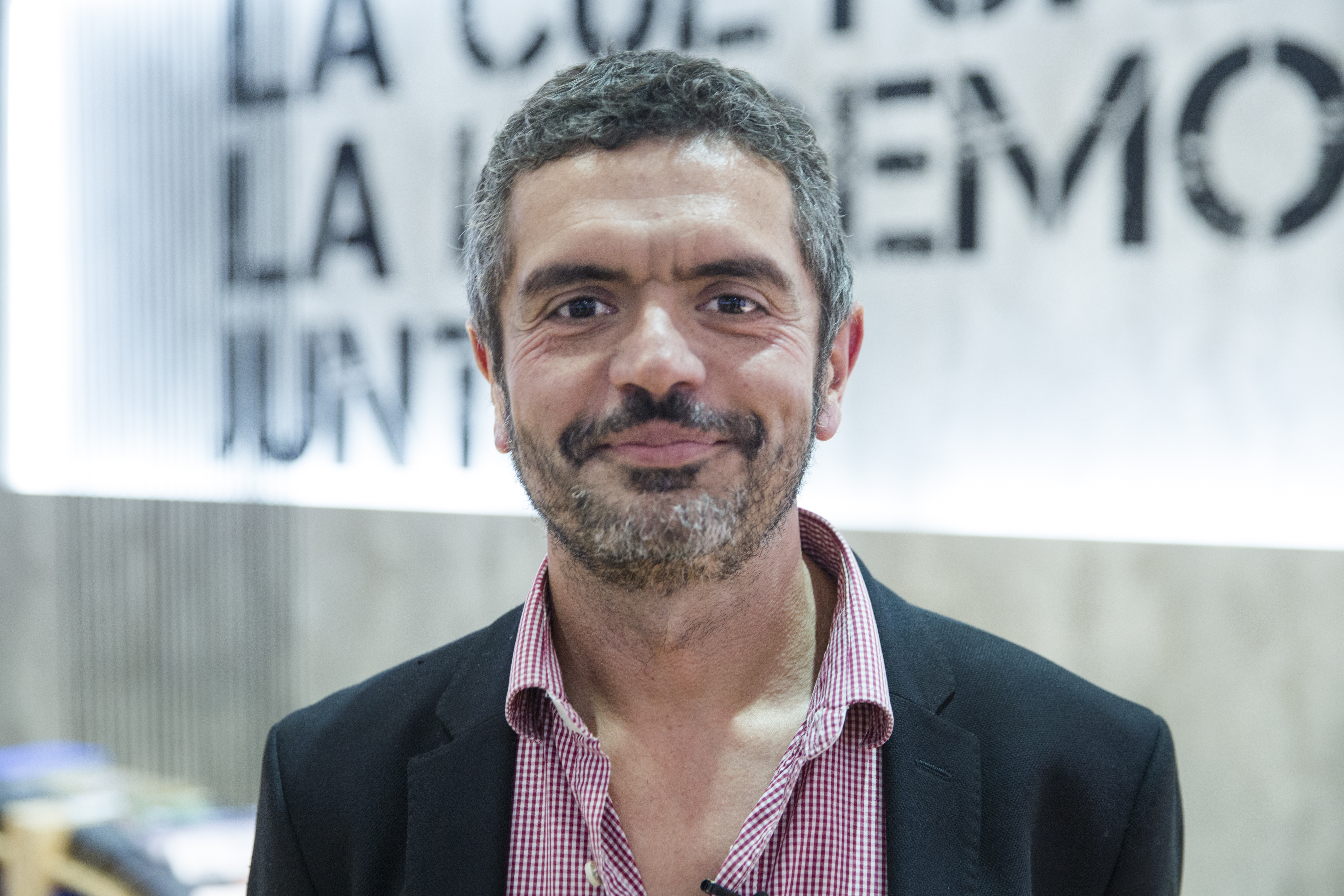 Buenos Aires, 2 de mayo de 2017.- Conversación con el escritor Leopoldo Brizuela , en el marco del ciclo "Qué cuentan los papeles de los escritores" en el stand del Ministerio de Cultura en la Feria Interancional del Libro Foto: Soledad Amarilla/ Ministerio de Cultura de la Nación